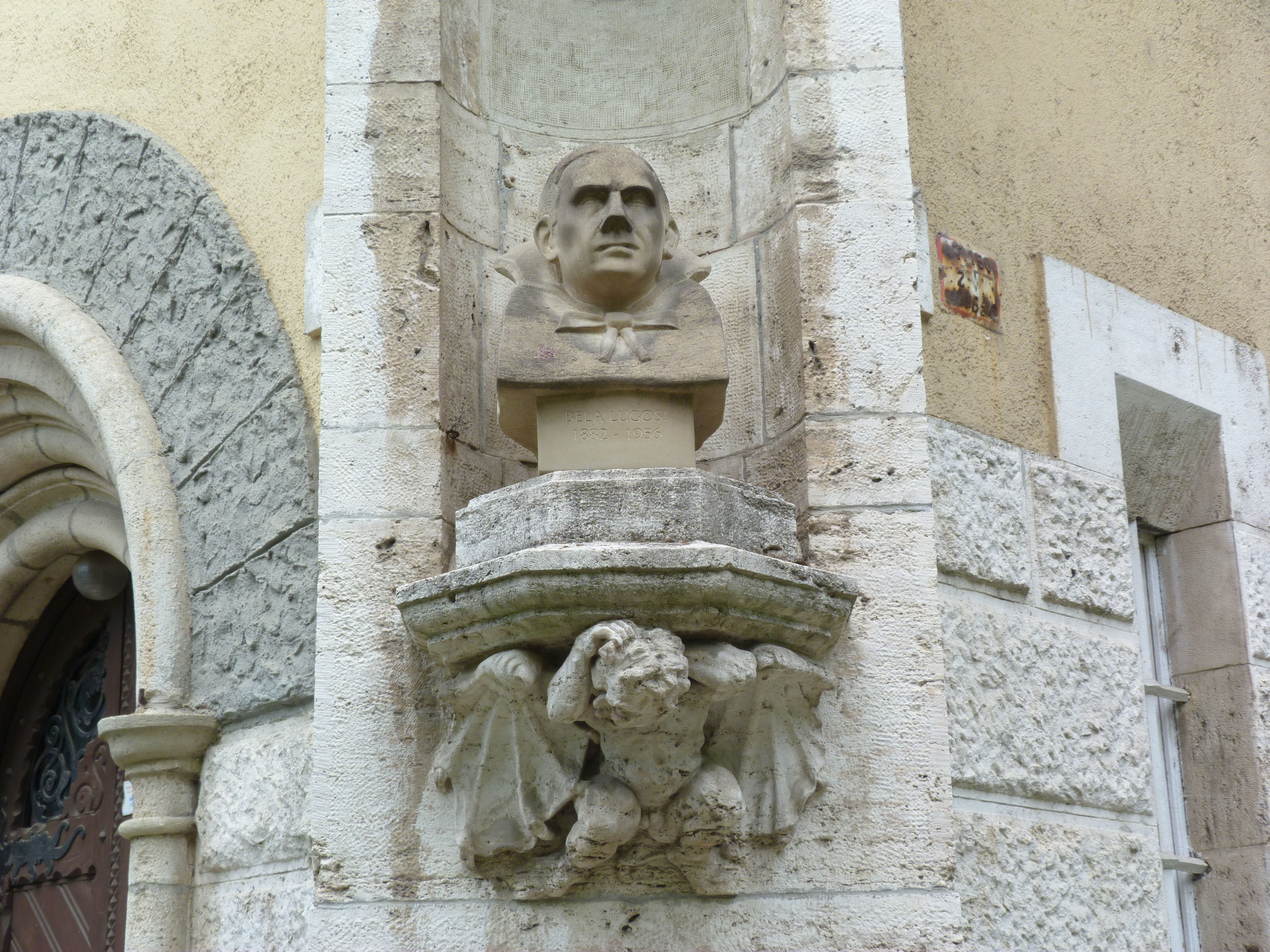 A felvétel 2012. május 19 -én készült Budapesten, a Városligetben. Lugosi Béla (1882-1956) szobra. ©© Köztulajdon, Derzsi Elekes Andor, Budapest, 2013, . A kép és filmfelvételek egészben, vagy részletekben másolását, bármilyen úton történő sokszorosítását és felhasználását a szerző ellenérték nélkül, jogutódjaira is kihatóan megengedi. Az engedély kiterjed a kereskedelmi célú hasznosításra is. Kéri azonban nevének feltüntetését a felhasználás során. A Metapolisz sorozat valamennyi képe és filmje Creative Commons alatti valamint kereskedelmi - for profit - célra is felhasználható. Ajánlott hivatkozás: Derzsi Elekes Andor: Metapolisz DVD line ©©Public domain, Derzsi Elekes Andor, Budapest, 2013, . You are authorised to use these photos and vids under Creative Commons – even for commercial, for profit purposes. Photos must be attributed to Derzsi Elekes Andor. All of the photos and vids in the Metapolisz DVD line are under Creative Commons and can be used even for commercial – for profit – purposes. Recommended Citation Derzsi Elekes Andor: Metapolisz DVD line